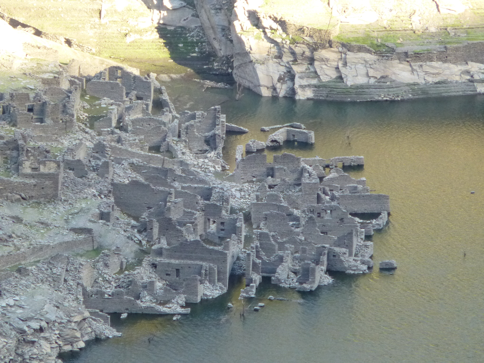 Ruinas de Salime emergiendo sel embalse oct 2014